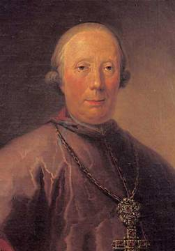 Filippo Maria Visconti, Arcivescovo di Milano 1784-1801